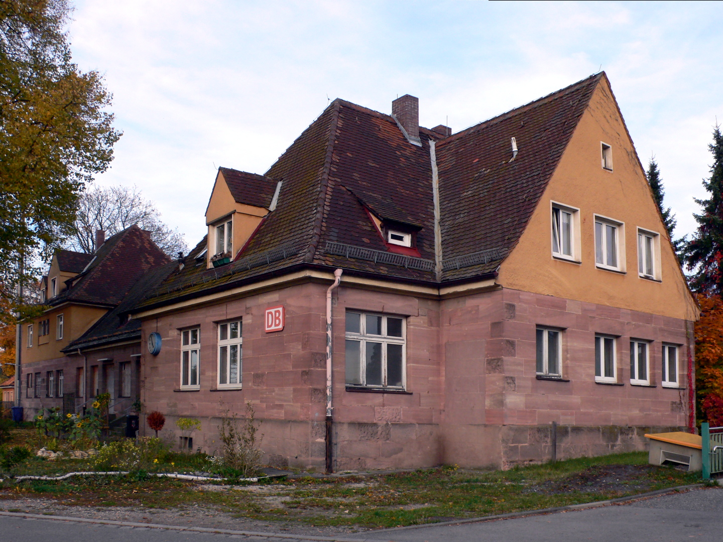 Bahnhof Nürnberg-Reichelsdorf, ehemaliges Empfangsgebäude